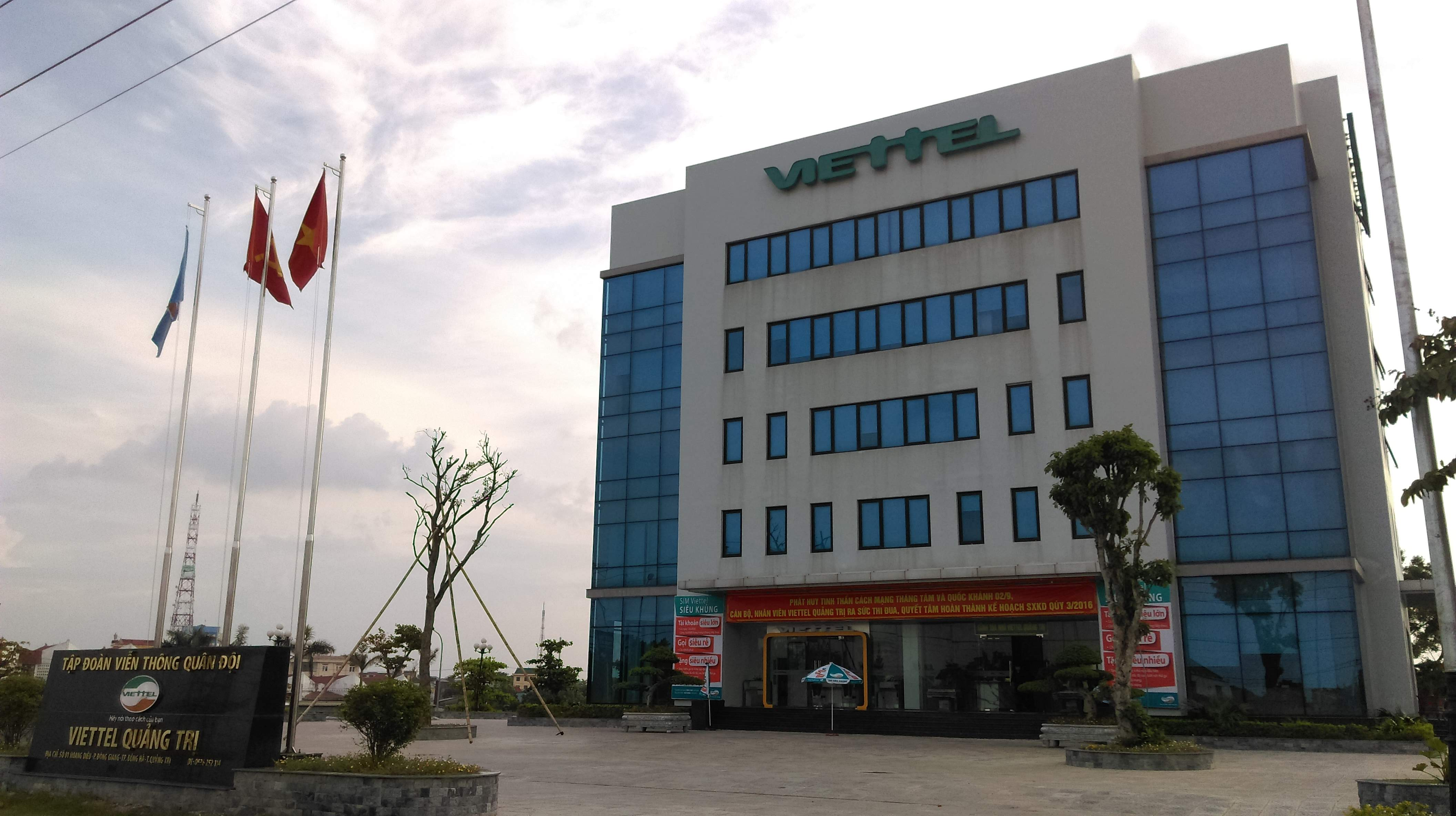 Viettel Quảng Trị